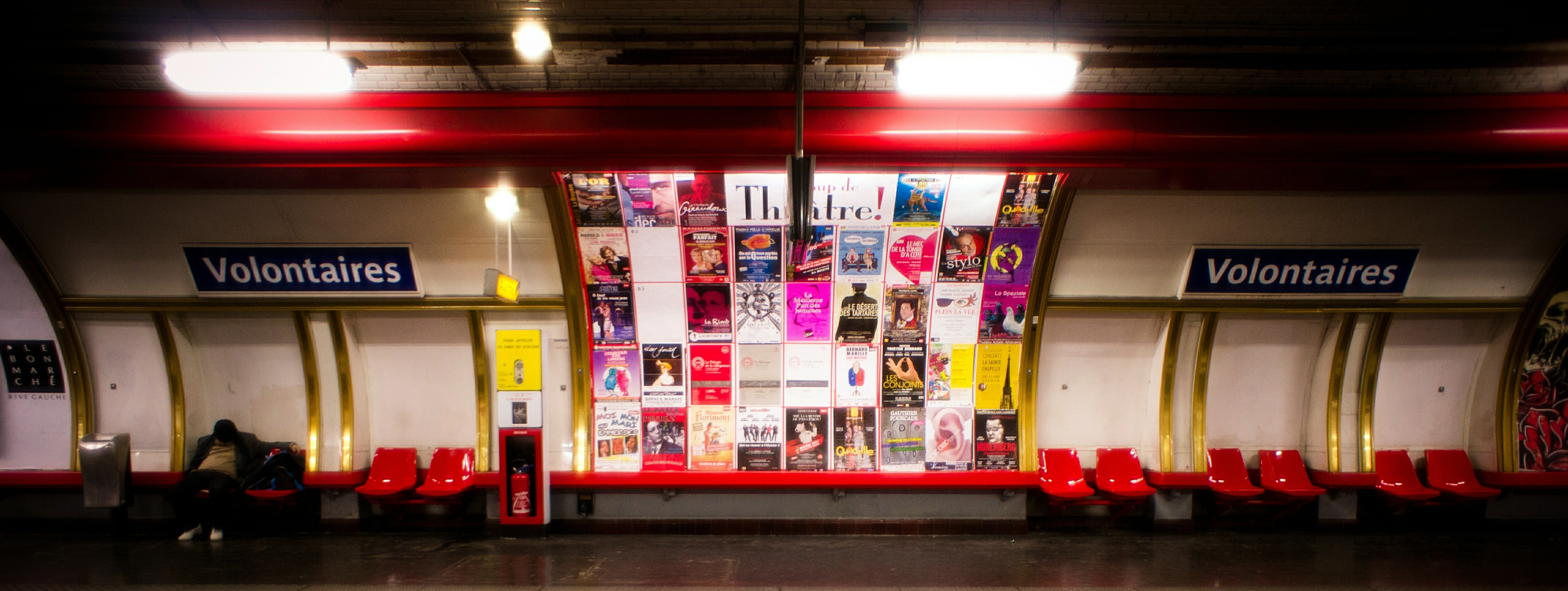 Volontaires Metro station, Paris.